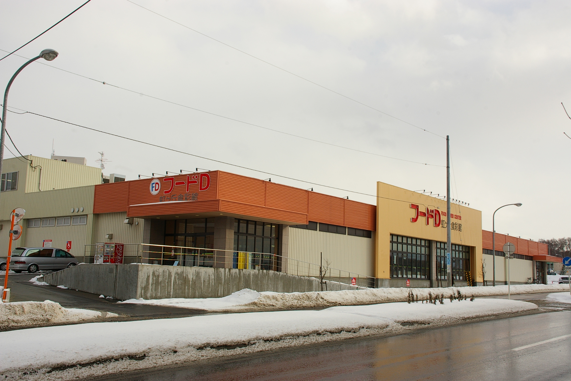 Food D Nijigaoka.